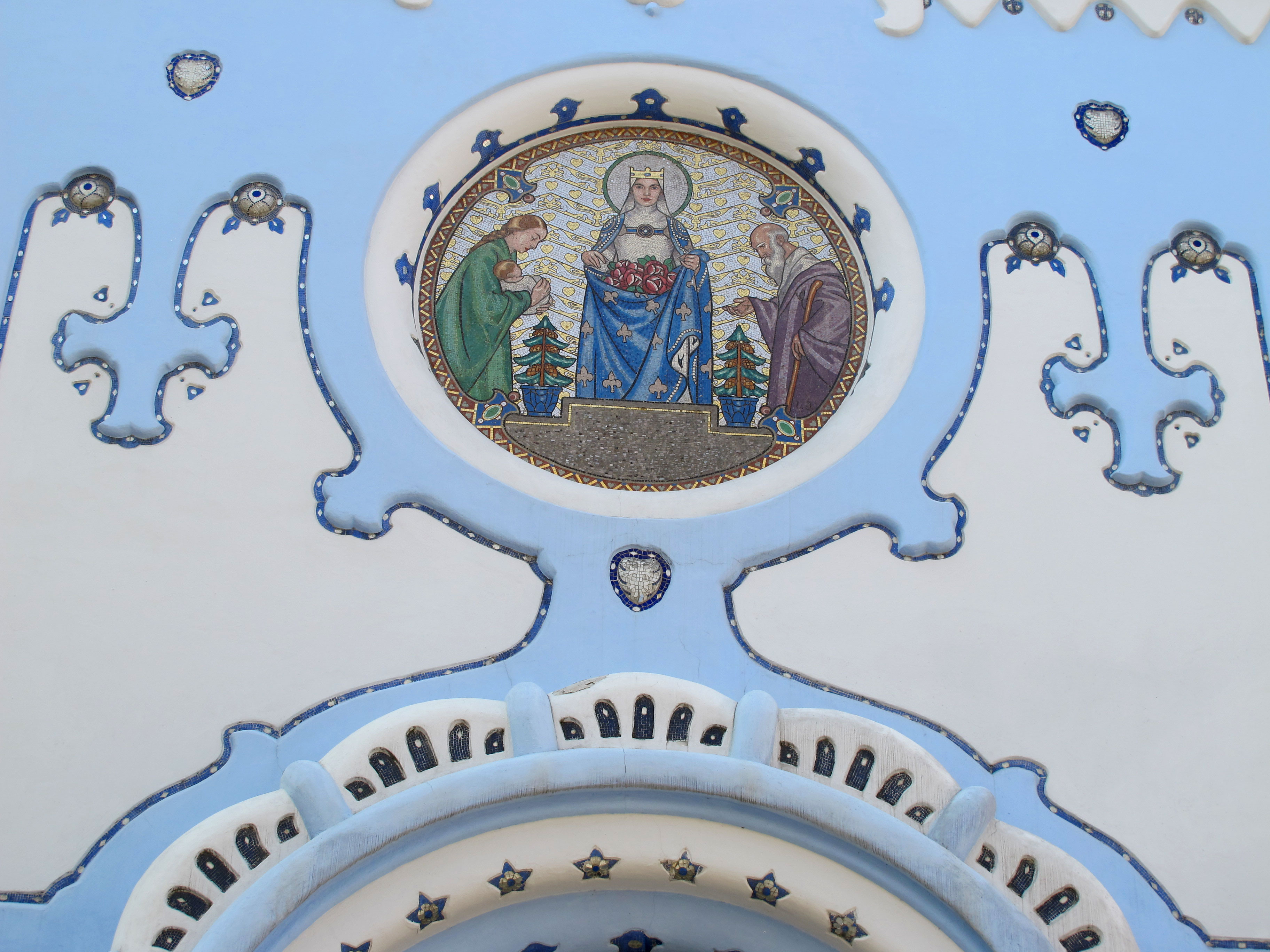 La Iglesia Azul - Bratislava - República Eslovaca Oficialmente conocida como la Iglesia de Santa Isabel de Hungría, pero comúnmente conocida simplemente como "la Iglesia Azul" por razones obvias, esto es lo más atractivo de Bratislava edificio de art nouveau. Su estilo, a veces conocida como la secesión de Hungría, se repite en la escuela primaria cercana en Grosslingova Street. Ambos fueron diseñados por el arquitecto Edmund Lechner Budapest y construido en el siglo XX (la iglesia fue consagrada el 11 de octubre de 1913). Tanto el interior como exterior de la iglesia están pintadas en tonos de azul claro y azul decorada con mayólicas, incluso el techo está decorada con cerámica vidriada azul. La estructura incorpora una torre redonda 36,8 metros. Fuente y más información de Bratislava : visit.bratislava.sk/en/index.asp Blog de Bratislava : .es/ Ver el videofotos de Bratislava aquí : Fotografías